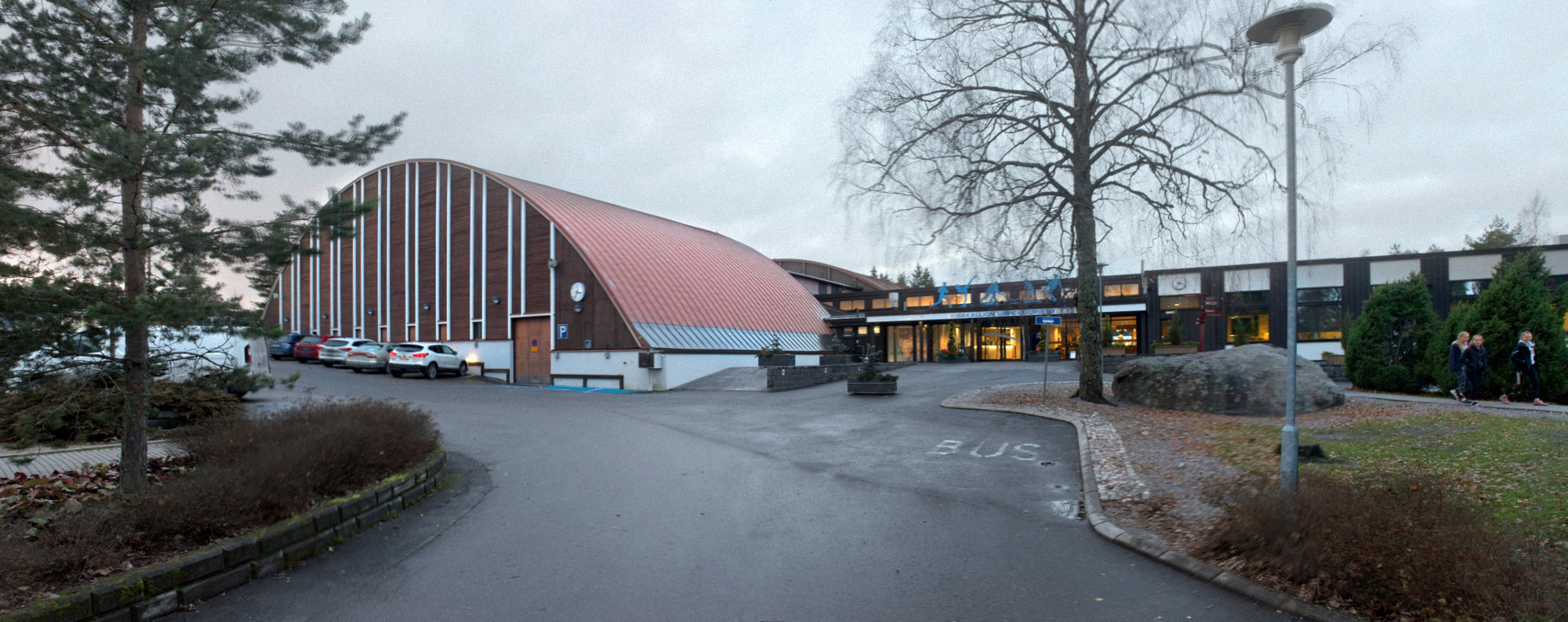 Kisakallion urheiluopisto marraskuussa 2017